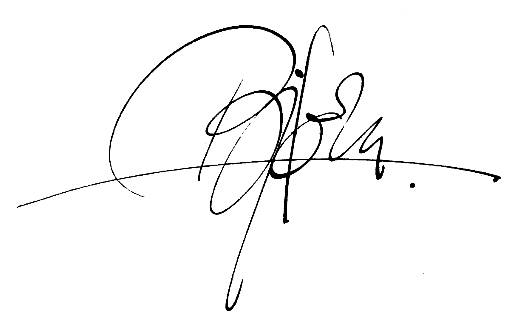 Persönliche Unterschrift "Bjørn" des Malers und Designers Bjørn Wiinblad